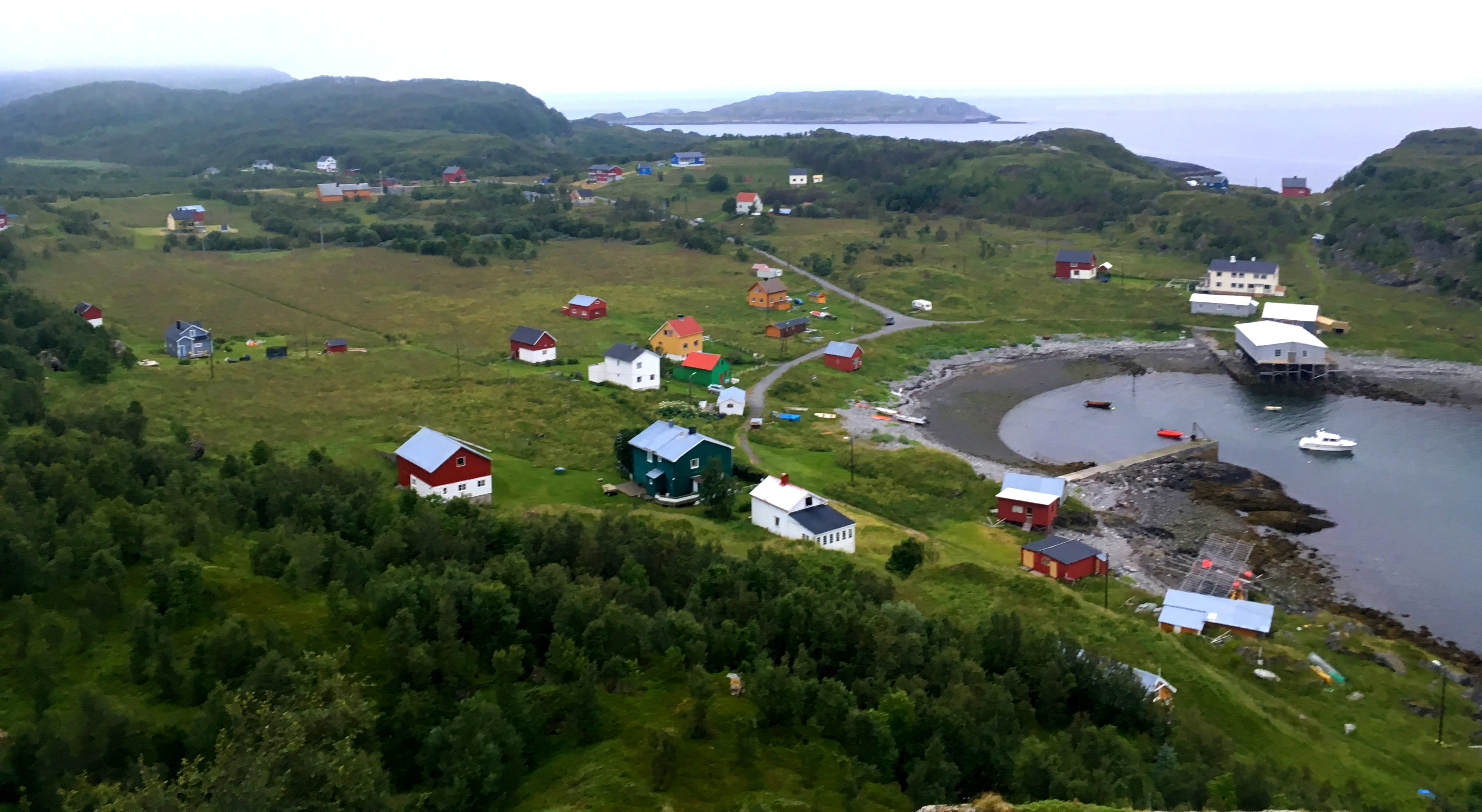 Andsnes 2016